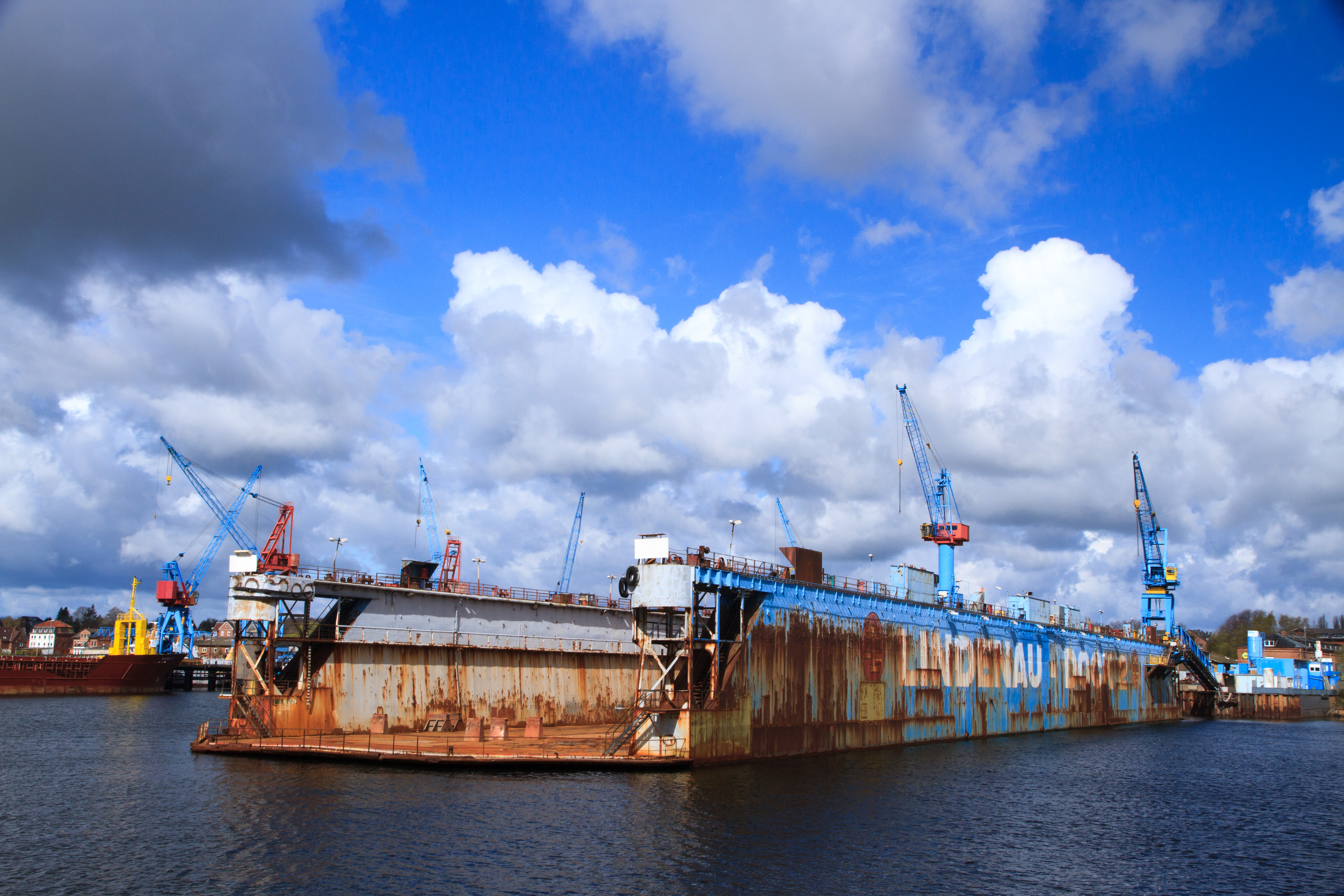 Lindenau Shipyard, Kiel